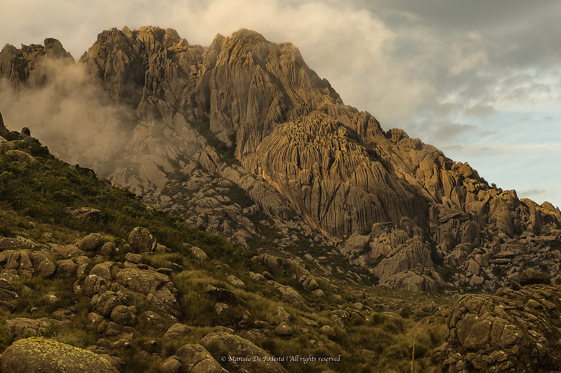 Pico das Agulhas Negra no Parque Nacional de Itatiaia